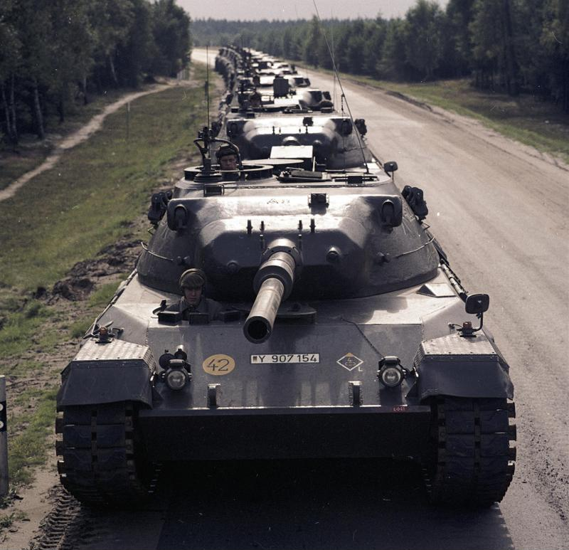 Reportage Bundeswehr Leopardpanzer (Munsterlager) [Munsterlager, Truppenübungsplatz in der Lüneburger Heide]